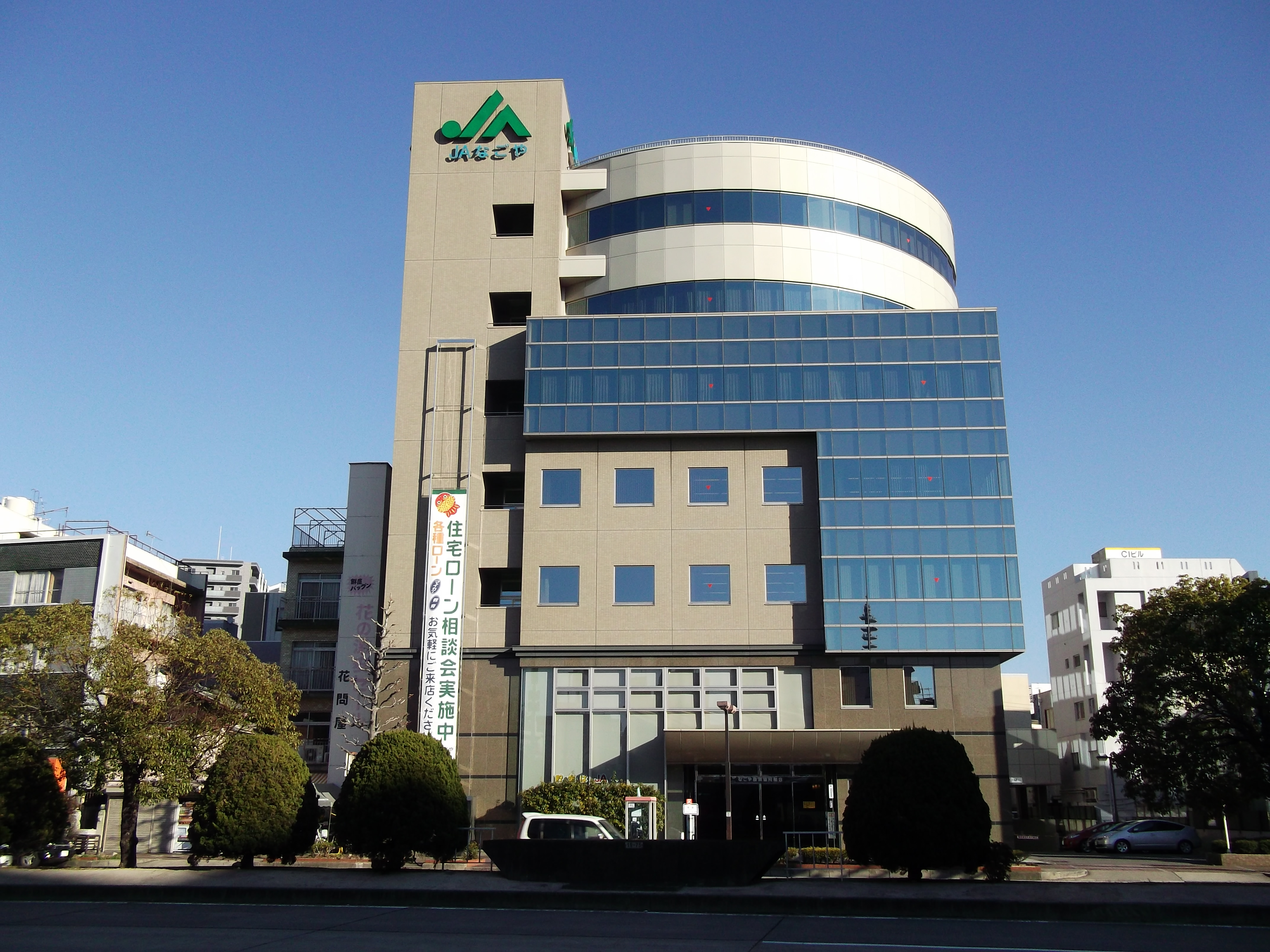 名古屋市東区代官町に所在するJAなごや本店を西側から写す